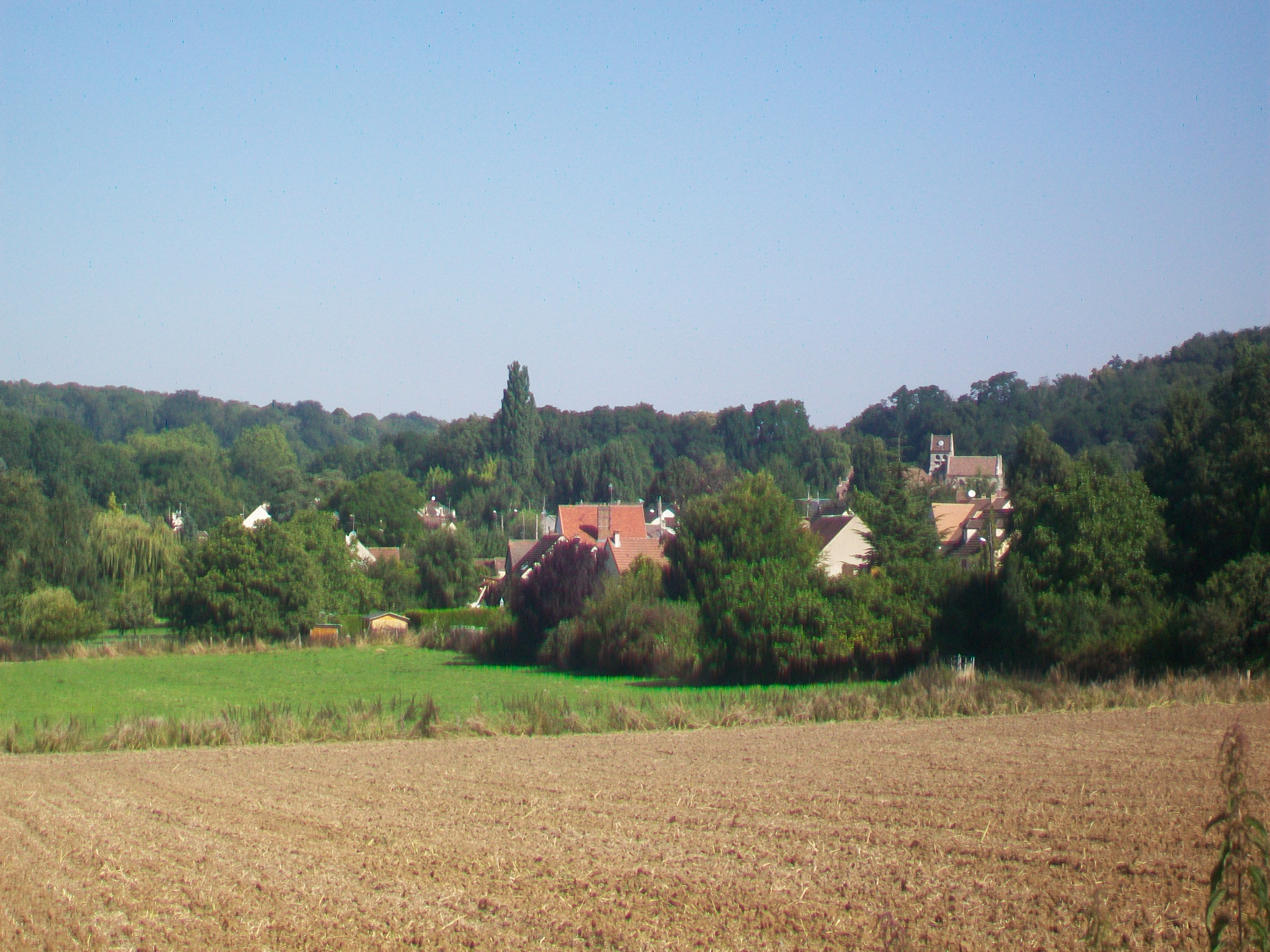 Approche du village par la rue du Plantin, en venant d'Angicourt.